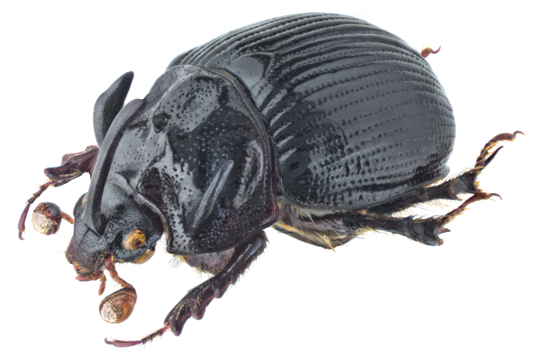 Family: Geotrupidae Size: 9,7 mm (7,0 to 10,0 mm) Origin: Europe Location: Germany, Bavaria, Dornheim leg U.Eitschberger, 1966, det. U.Schmidt Photo: U.Schmidt, 2015